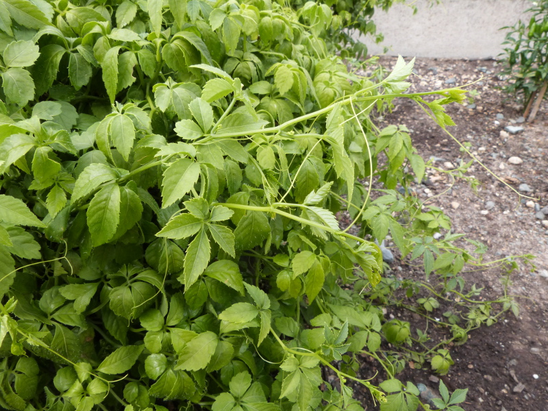 Jiaogulan, at Ökologisch-Botanischer Garten Bayreuth